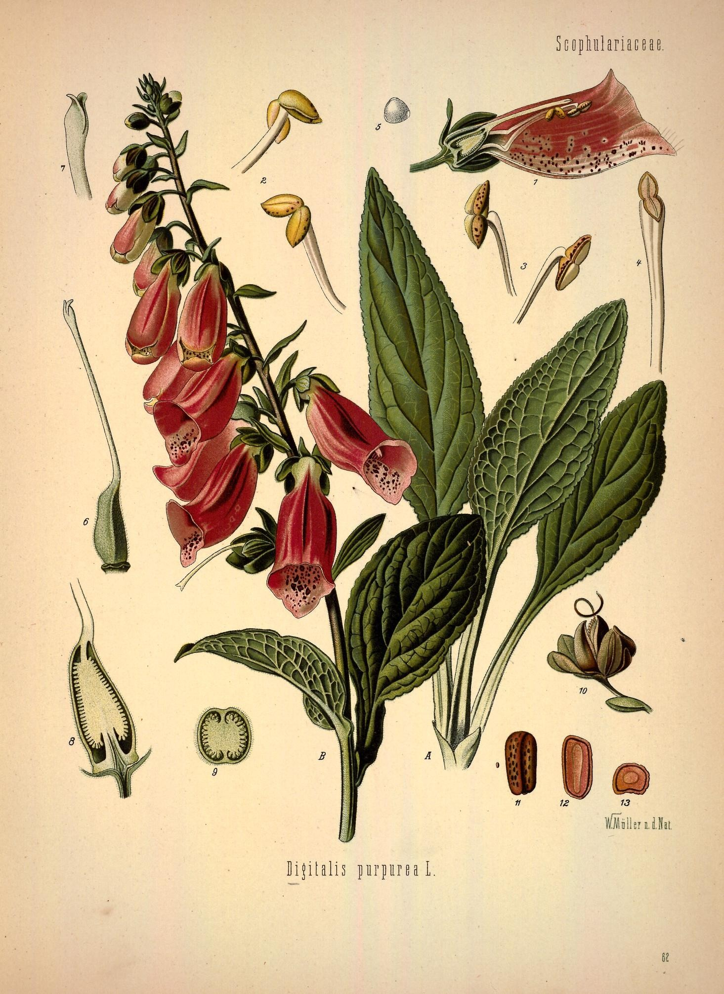 Roter Fingerhut. A B Pflanze in natürl. Grösse; 1 Blüthe im Längsschnitt, wenig vergrössert; 2 Staubgefäss, vergrössert; 3 und 4 dieselbe geöffnet, desgl.; 5 Pollen, desgl.; 6 Stempel, desgl.; 7 Griffel mit Narbe, desgl.; 8 Fruchtknoten im Längsschnitt, desgl.; 9 derselbe im Querschnitt, desgl.; 10 Frucht nat. Grösse; 11 Same, vergrössert; 12, 13 derselbe zerschnitten, desgl.